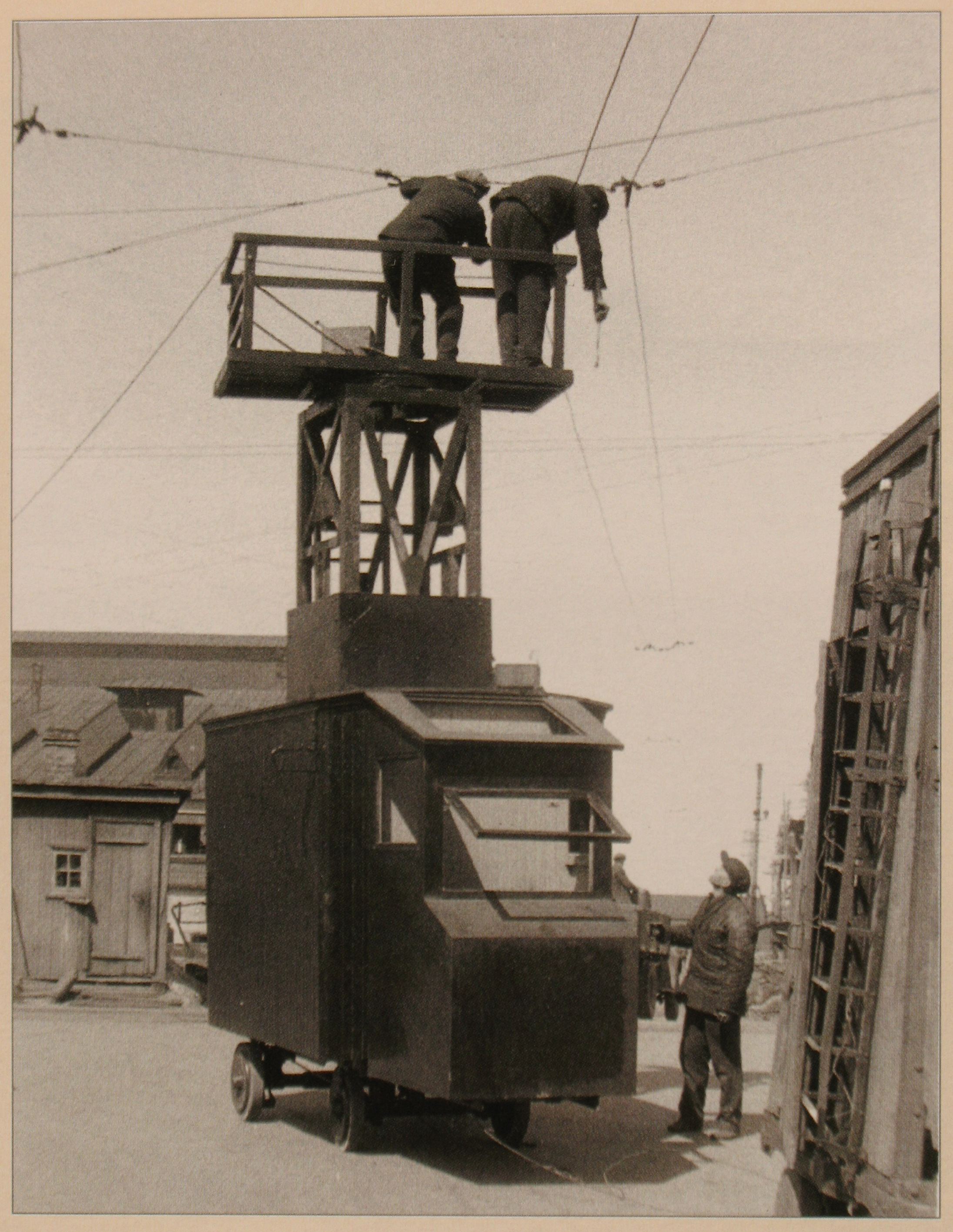 . "Ремонт троллейбусной линии. Москва. 1935 год." Возможно (не точно), недалеко от первого гаража троллейбусов в Головановском переулке (б. село Всехсвятское, район Аэропорт). Стоит передвижная ремонтная вышка (не являющаяся троллейбусом), с которой рабочие ремонтируют провода.